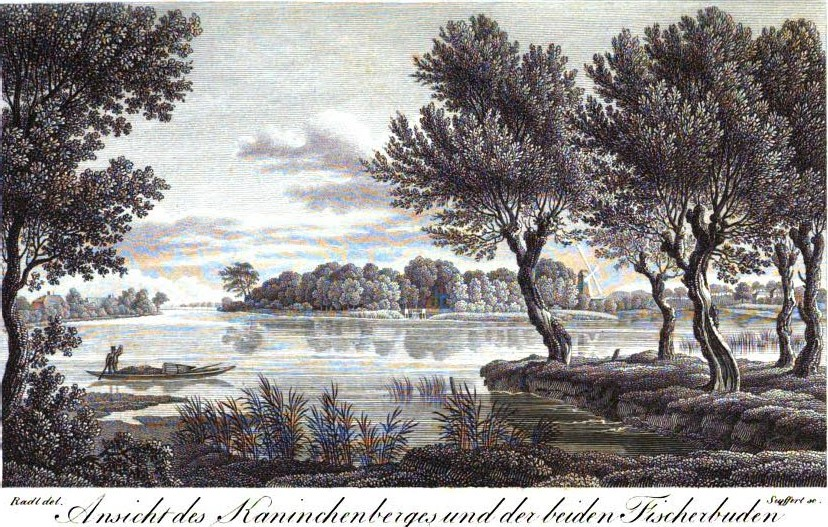 Ansicht des Kaninchenberges und der beiden Fischerbuden aus Heinrich Christian Zietz: Ansichten der Freien Hansestadt Lübeck und ihrer Umgebungen. 1822